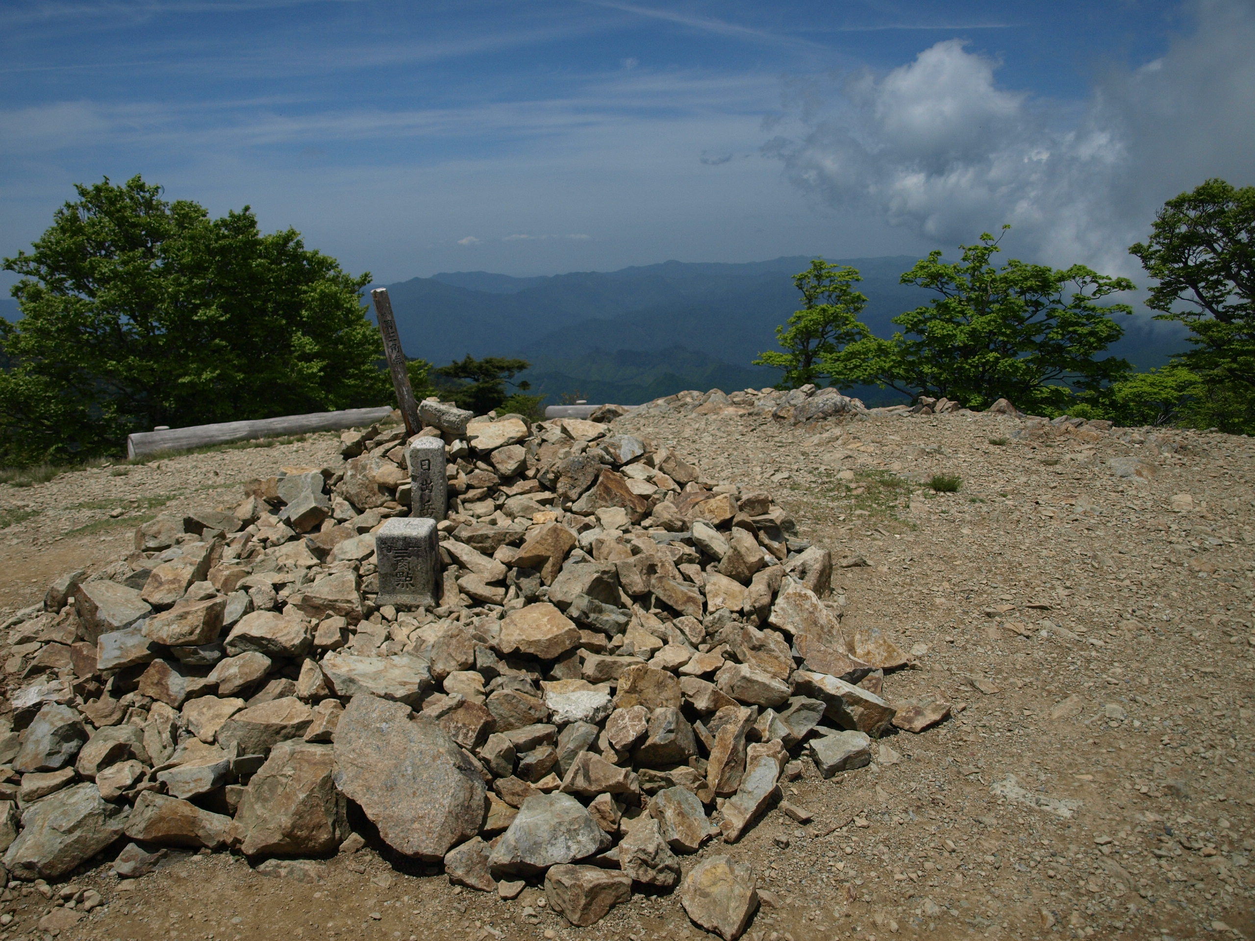 大台ケ原 日出ヶ岳（標高:1694.9m）Flickrより転載